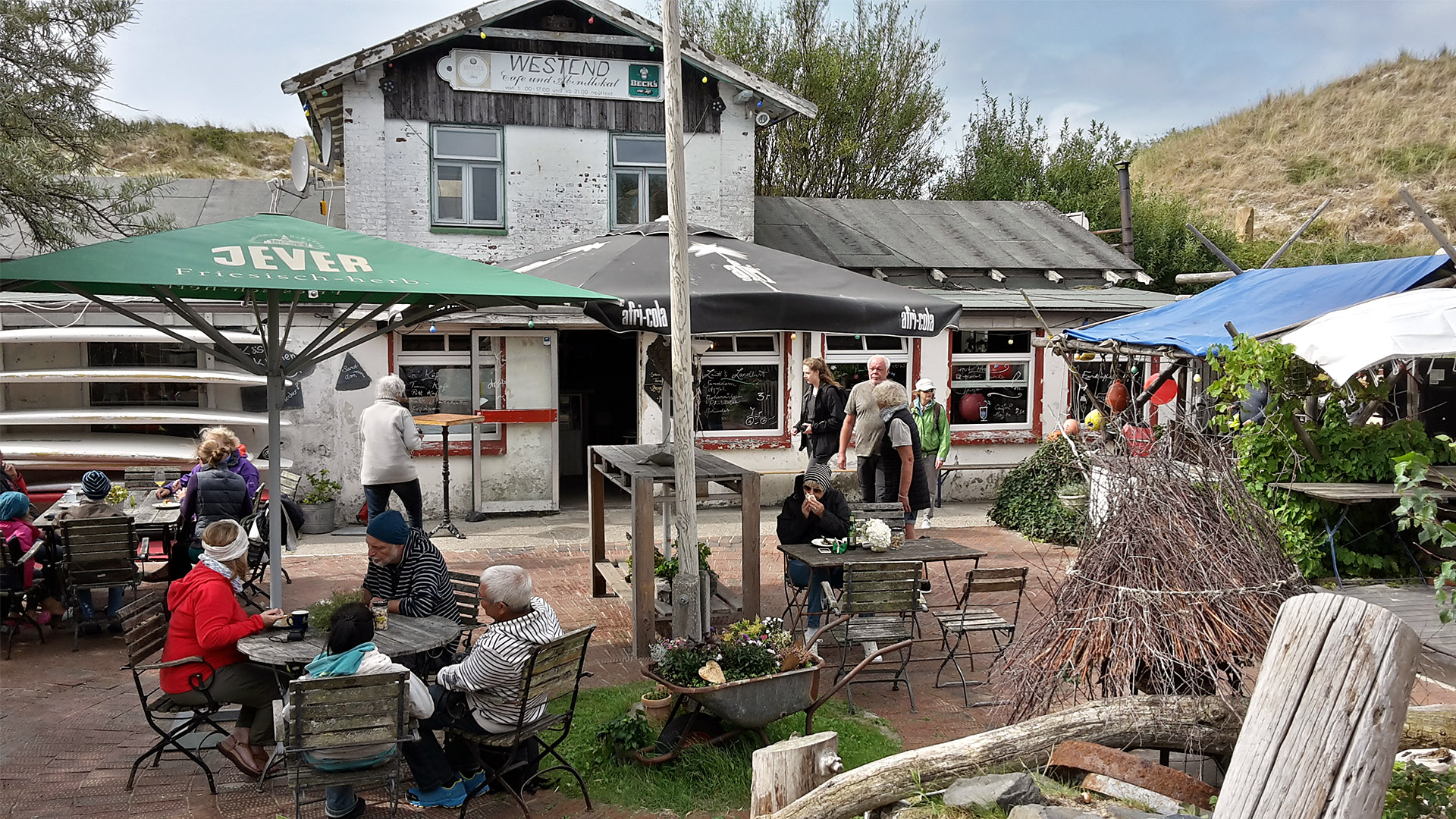 Spiekeroog Nordsee Kultkneipe Laramie